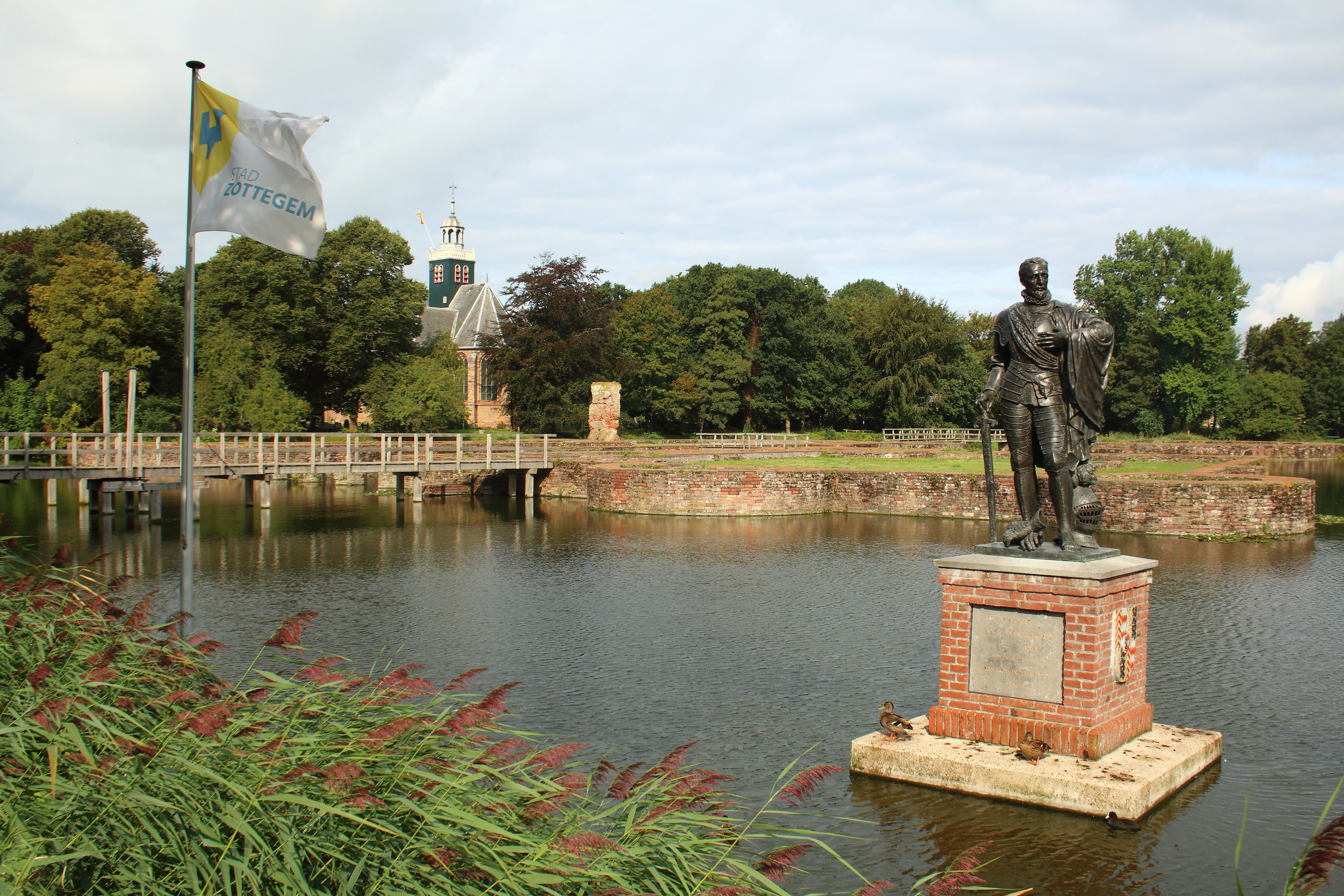 standbeeld van Lamoraal van Egmont, Slot op den Hoef / Kasteel Egmond, Egmond aan den Hoef, Bergen, Noord-Holland, Nederland